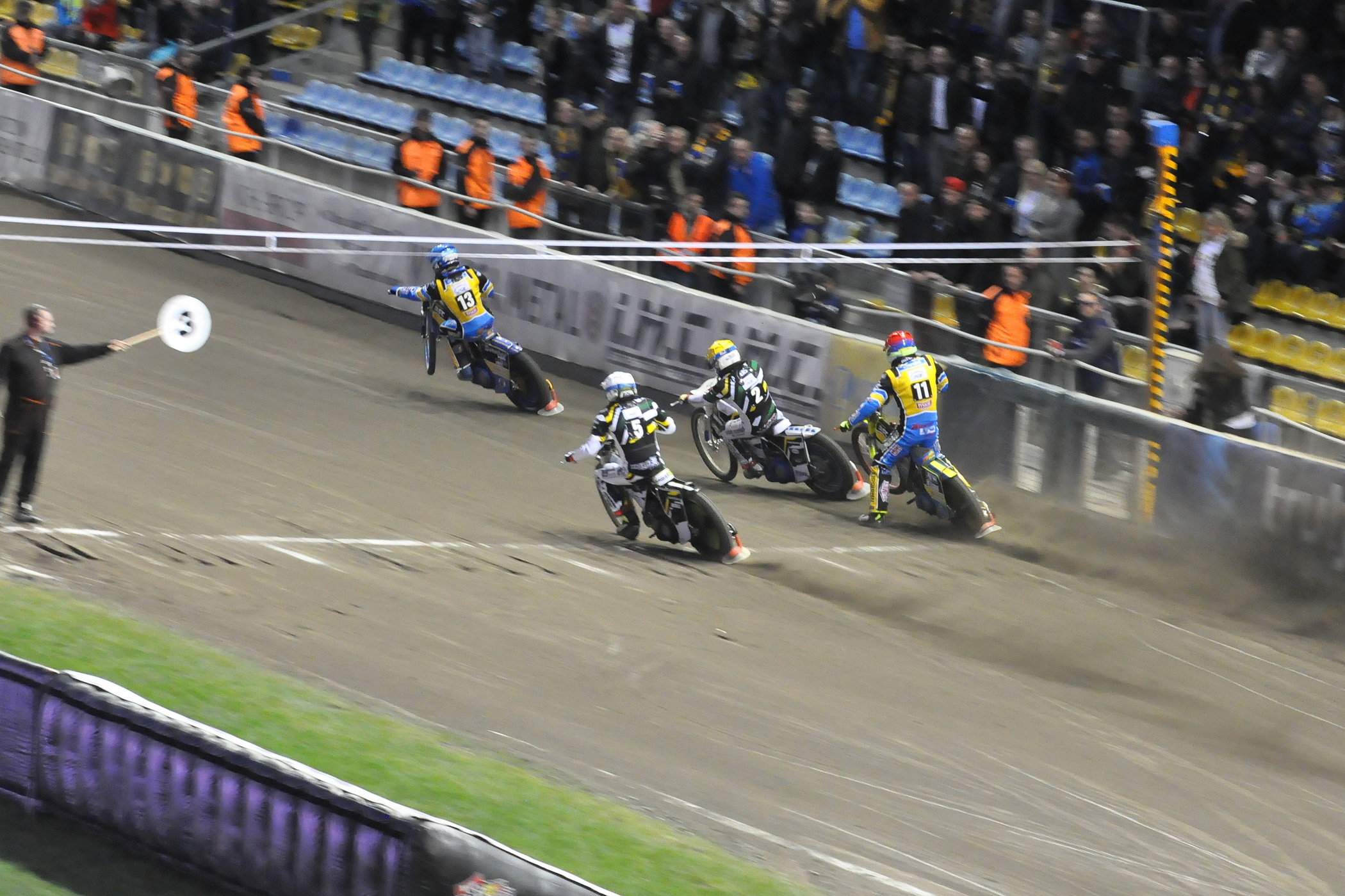 Gorzów Wlkp., 5.05.2019 r. Żużlowe Derby Ziemi Lubuskiej nr 97, bieg 15 który zakończył się remisem (do mety pozostały trzy okrążenia). Zwyciężył Bartosz Zmarzlik (n-13) przed Nickim Pedersenem (ż-2), Martinem Vaculikiem (b-5) i Krzysztofem Kasprzakiem (cz-11). Mecz zakończył się zwycięstwem zielonogórzan 49:41